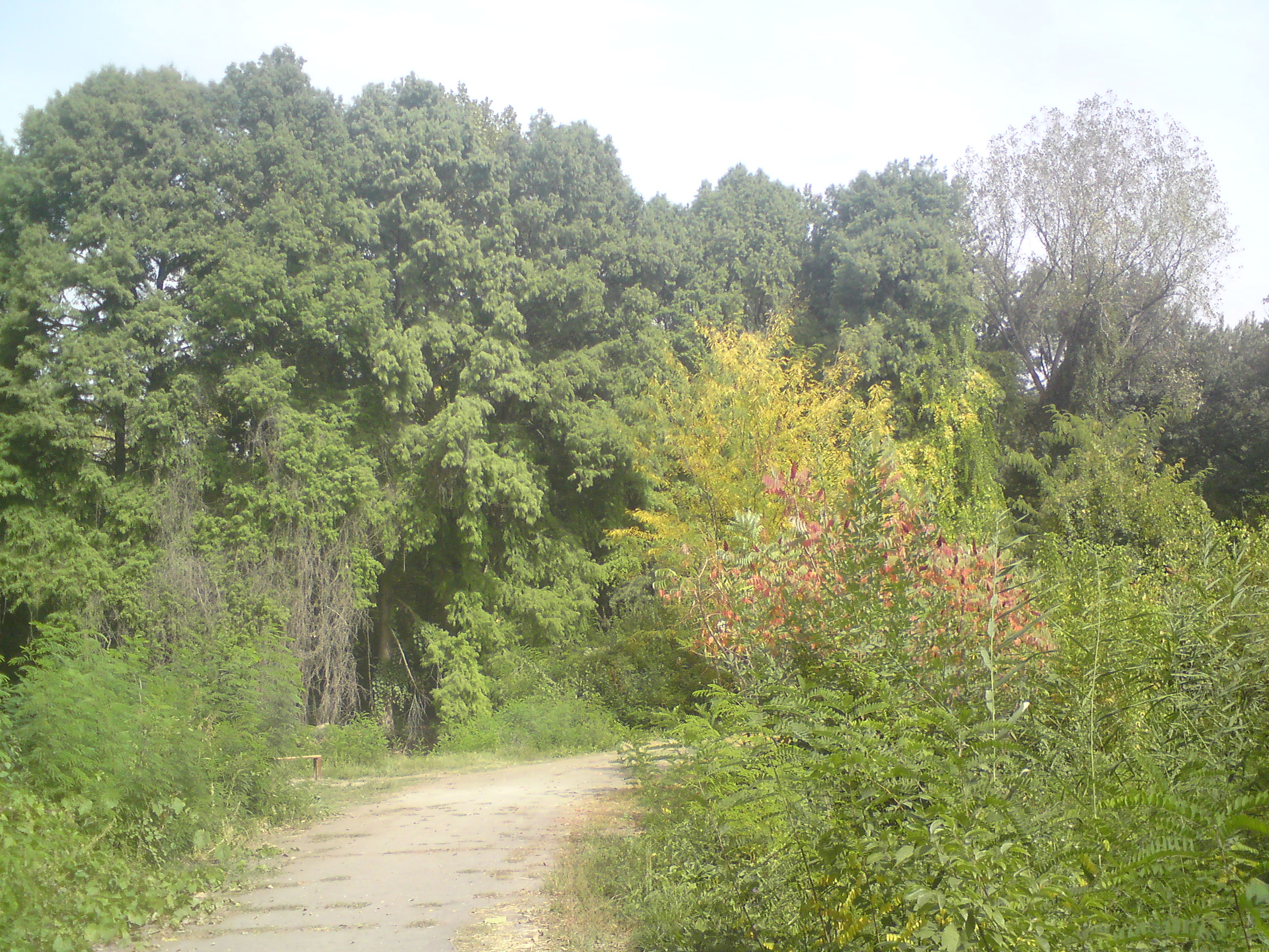 Коллекция североамериканских растений в ботаническом саду города Ташкента